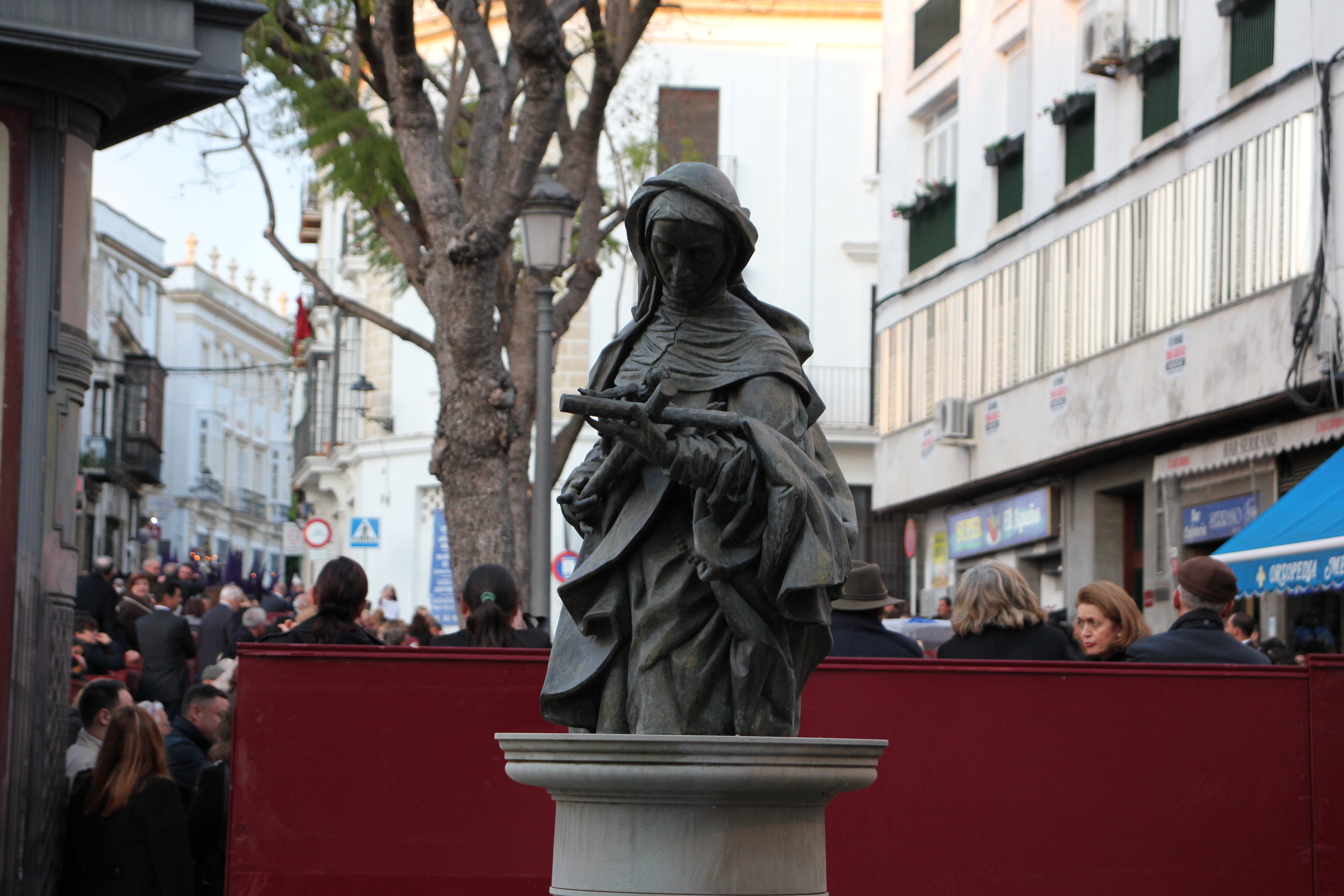 Monumento a María Antonia de Jesús Tirado en Jerez de la Frontera (España)